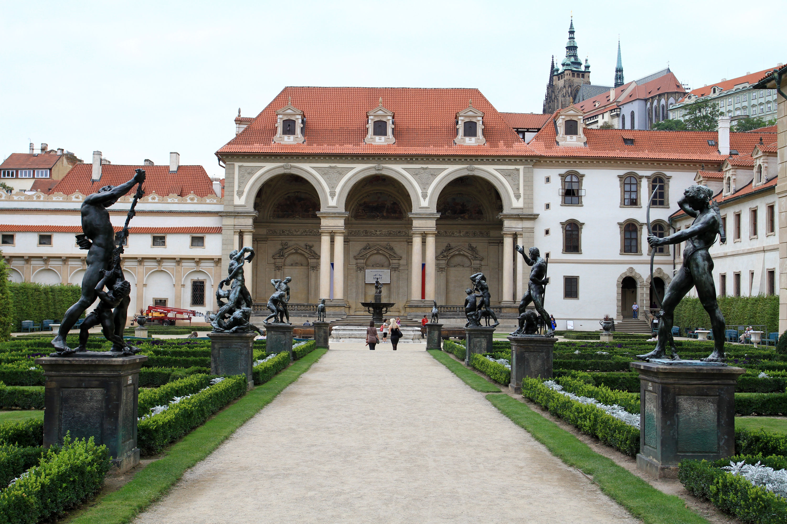 Valdštejnský palác (Malá Strana), Praha 1-Malá Strana, Valdštejnské náměstí 17/4, Valdštejnská 17/1, 17/3